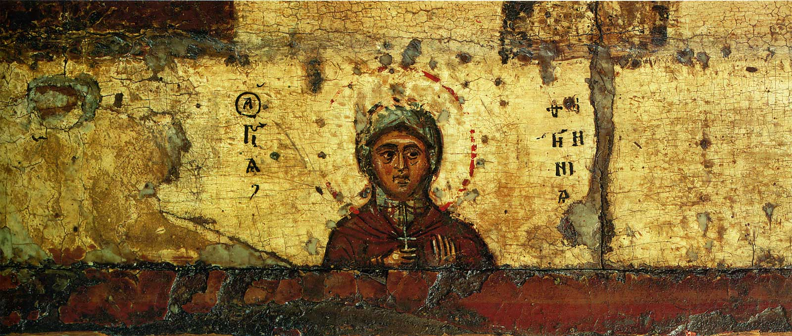 Фотиния. Деталь иконы «Николай Чудотворец (поясной) с избранными святыми».